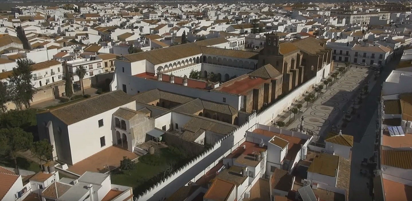 Vista desde dron del Monasterio de Santa Clara en Moguer (España)